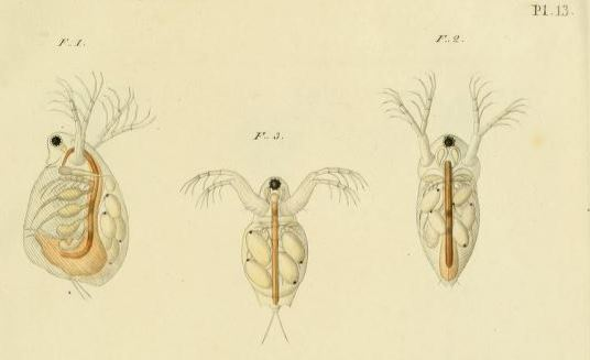 Louis Jurine, Histoire des monocles qui se trouvent aux environs de Genève, détail de la planche 13.